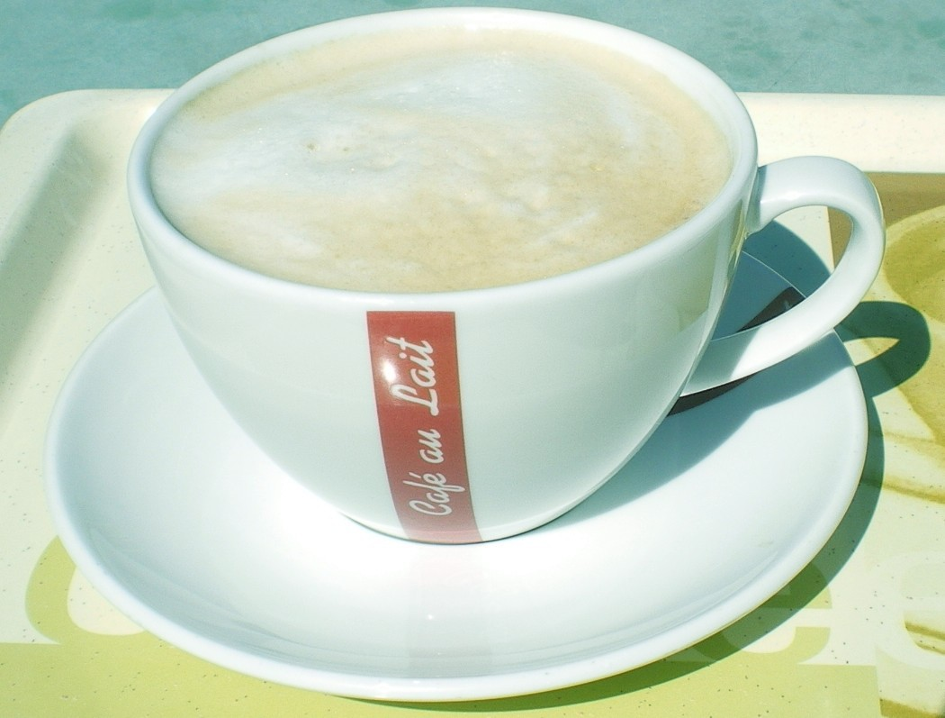 Kaffeetasse mit Milchkaffee (Café au lait)